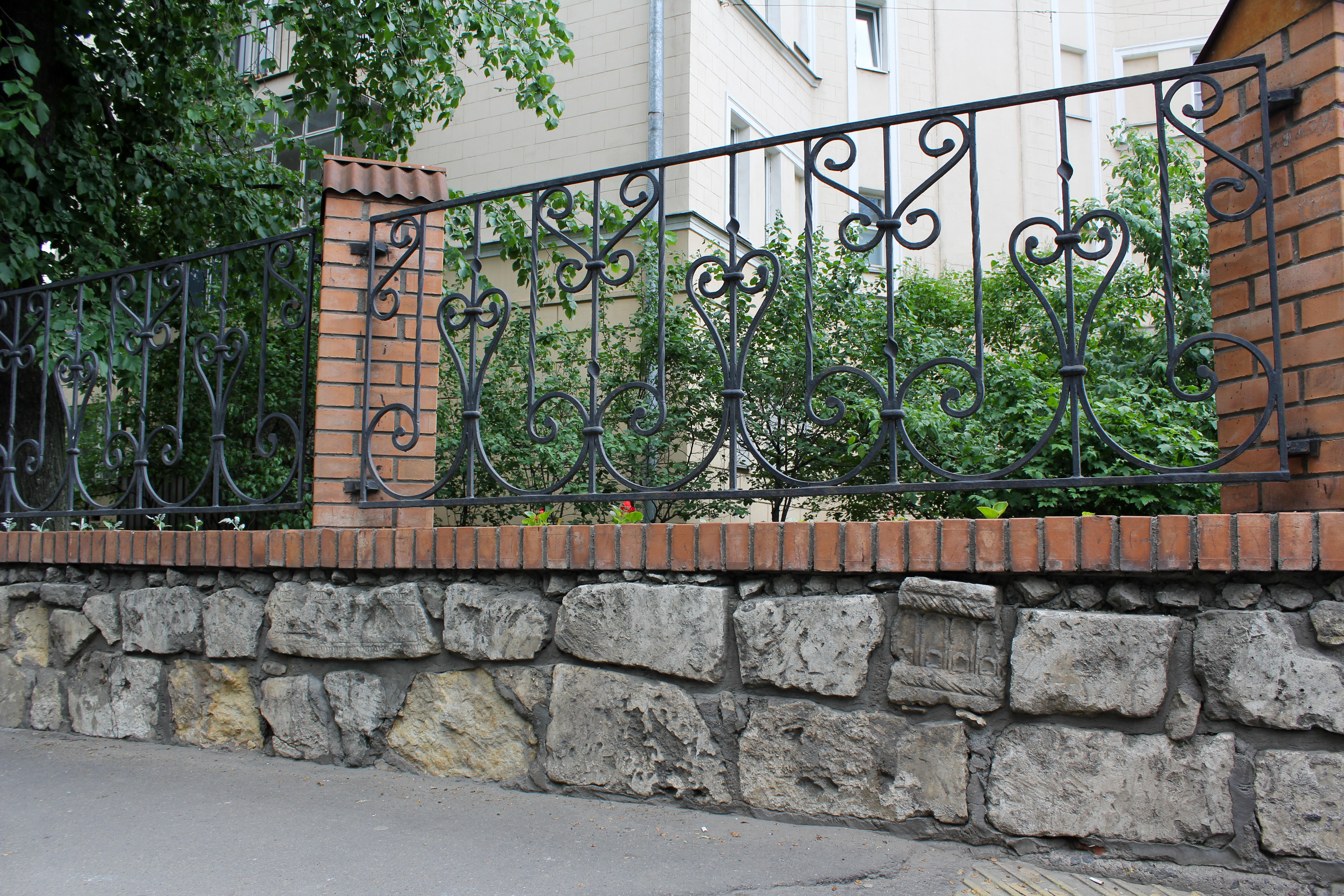 Декоративная ограда, в основе которой белокаменные надгробия XVI—XVII веков с существовавшего у церкви древнего некрополя на 1-й Спасоналивковском переулке в Москве